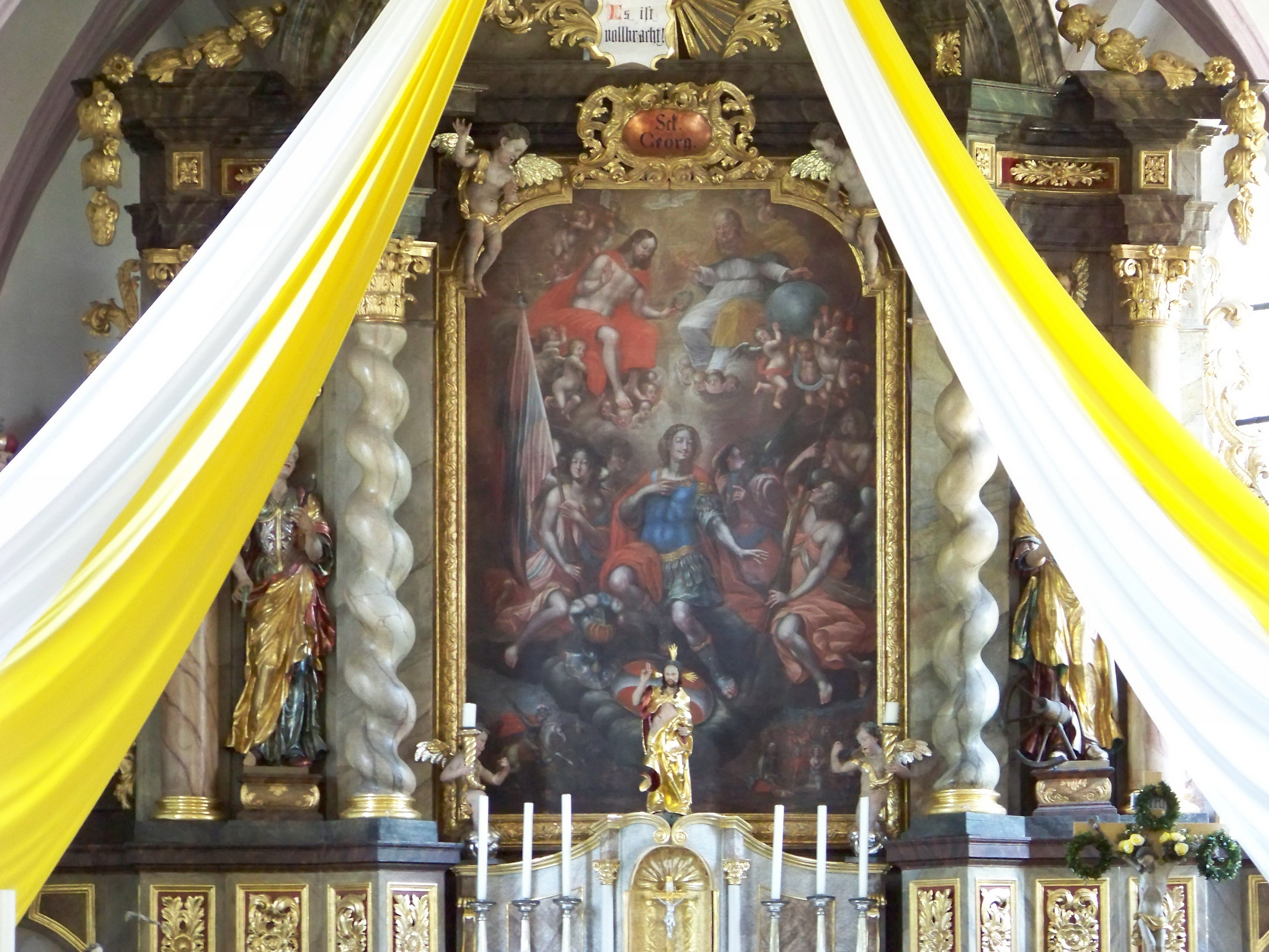 Altdorf bei Landshut. Eugenbach, Kichweg 21. Katholische Pfarrkirche St. Georg. Saalbau aus dem 10. Jahrhundert, westliche Erweiterung 13./14. Jahrhundert, spätgotischer Chor 1516/17 mit Netzgewölbe (dendrochronologisch datiert). Rokoko Hochaltar um die Mitte des 18. Jahrhundert mit vier schräg gestellten Säulen. Das Altarblatt stellt die Glorie des Hl. Georg nebst Szenen aus seinem Leben dar. Lebensgroße Seitenfiguren: St. Leopold, St. Apollonia, St. Katharina und St. Florian.